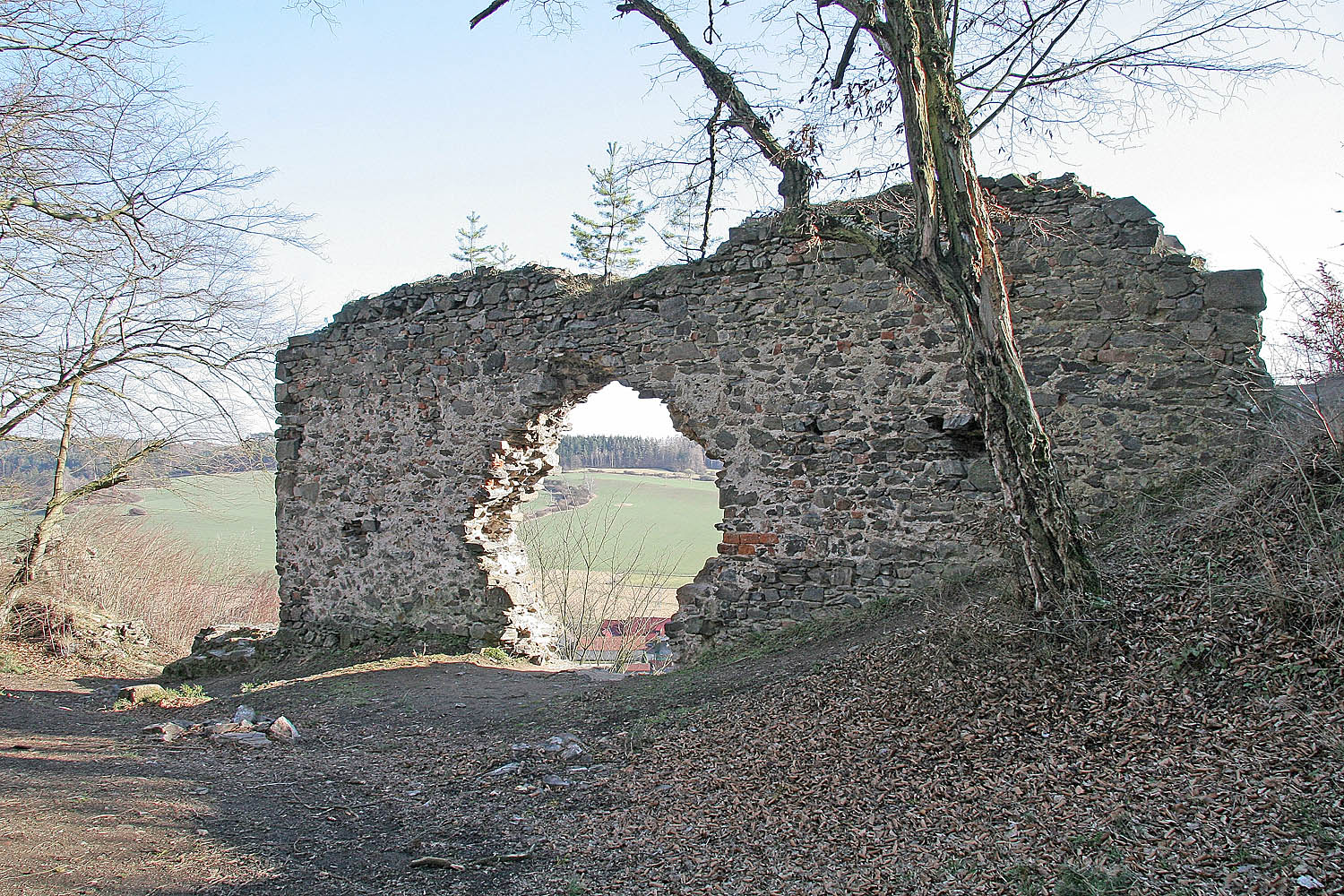 zbytek zdi nad řekou Sázavou na hradě Zbořený Kostelec